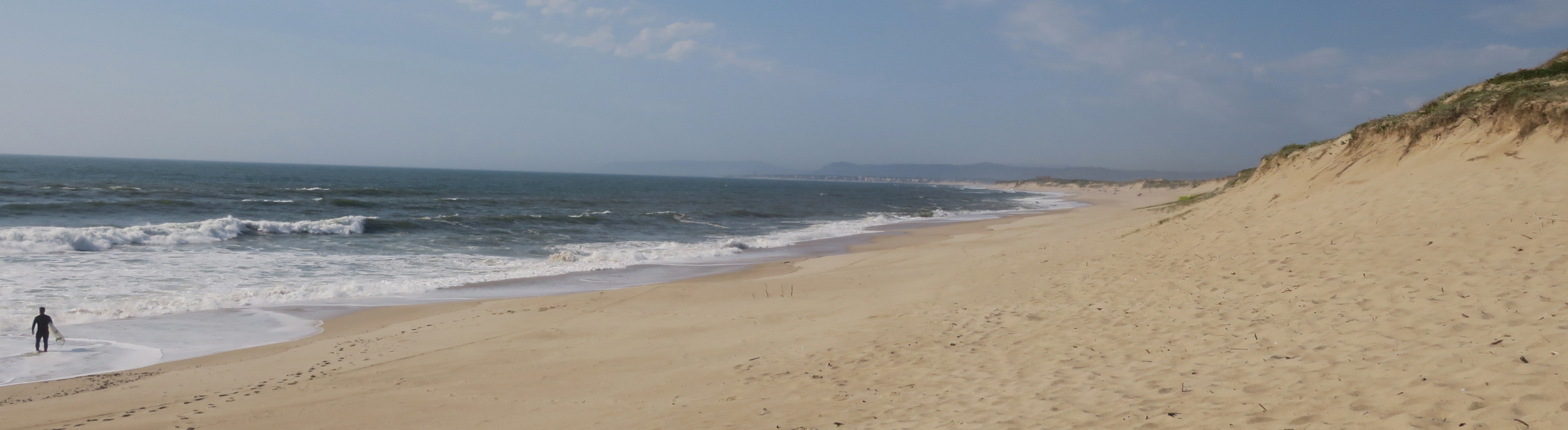 Surfista nas dunas da Póvoa de Varzim. A presente imagem está licenciada e não pode ser utilizada sem licença. Para outras licenças contactar autor.